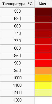 Цвета каления — это цвета свечения металла, раскалённого до высокой температуры. Спектр теплового излучения зависит от температуры, поэтому наблюдая цвета каления можно достаточно быстро, хоть и без высокой точности, определить температуру металла, что часто применяется при термообработке и ковке. Более того, до изобретения бесконтактных термометров это было единственным способом судить о температуре металла. Сокращённые названия цветов каления («красное каление», «белое каление») часто используются металлургами вместо указания температуры.